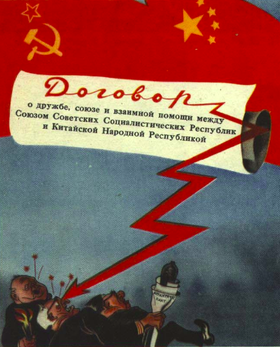 195103 中苏友好同盟互助条约 叶菲莫夫